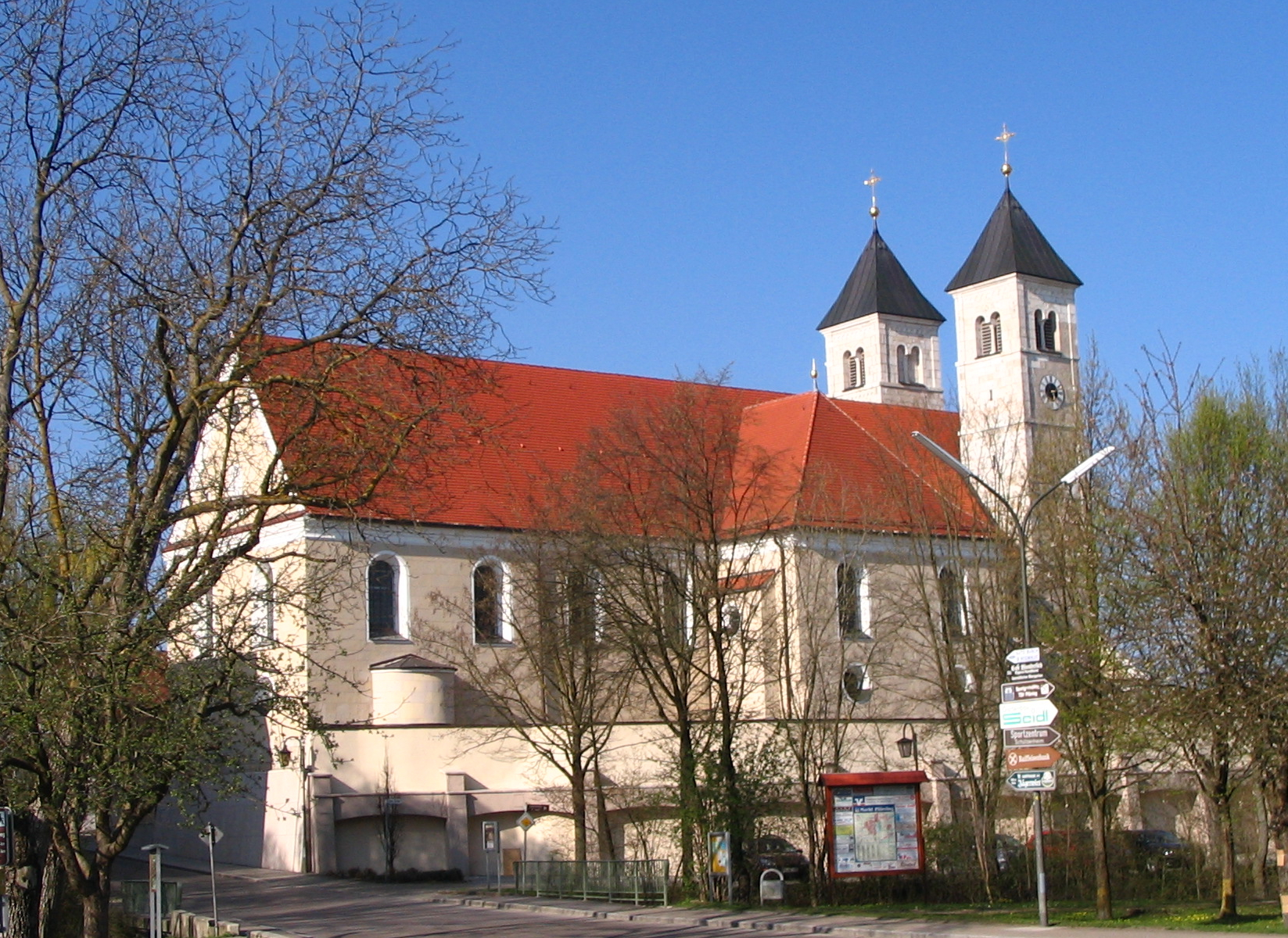 Pfarrkirche St. Leonhard in Pförring, Landkreis Eichstätt